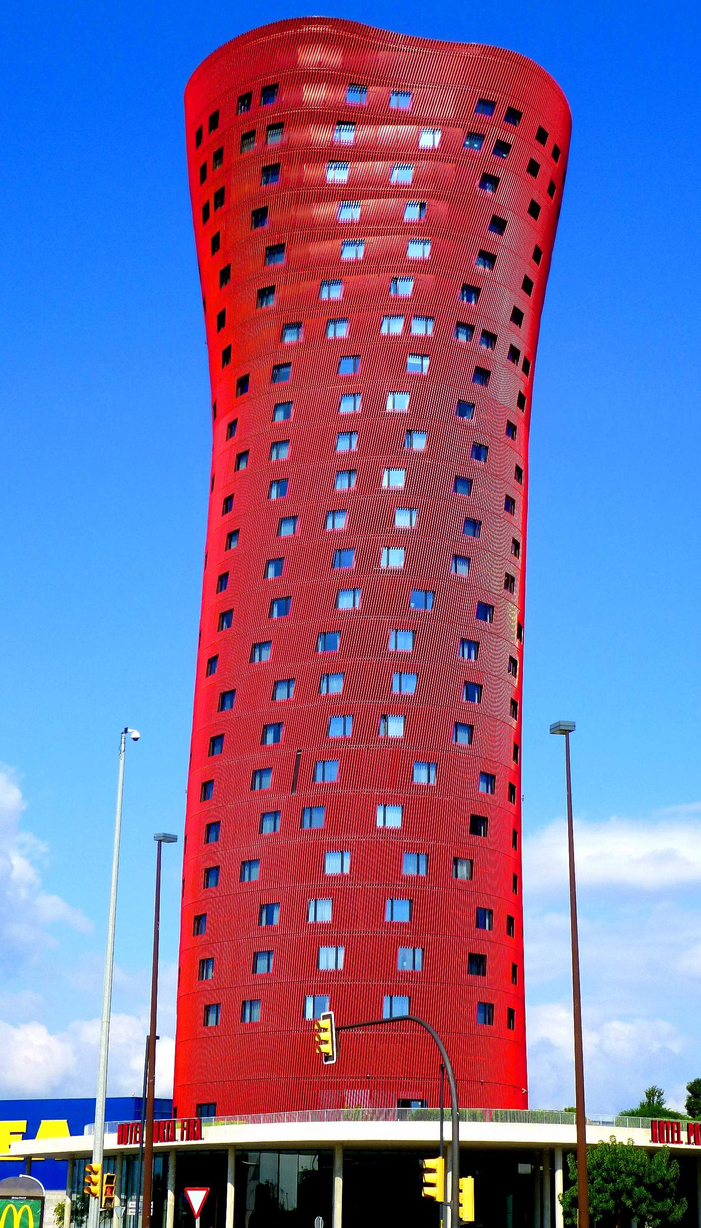 Hotel Porta Fira, junto con la Torre Realia BNC conocidos como las Torres Porta Fira o Torres de Toyo Ito, en Hospitalet de Llobregat (Barcelona)